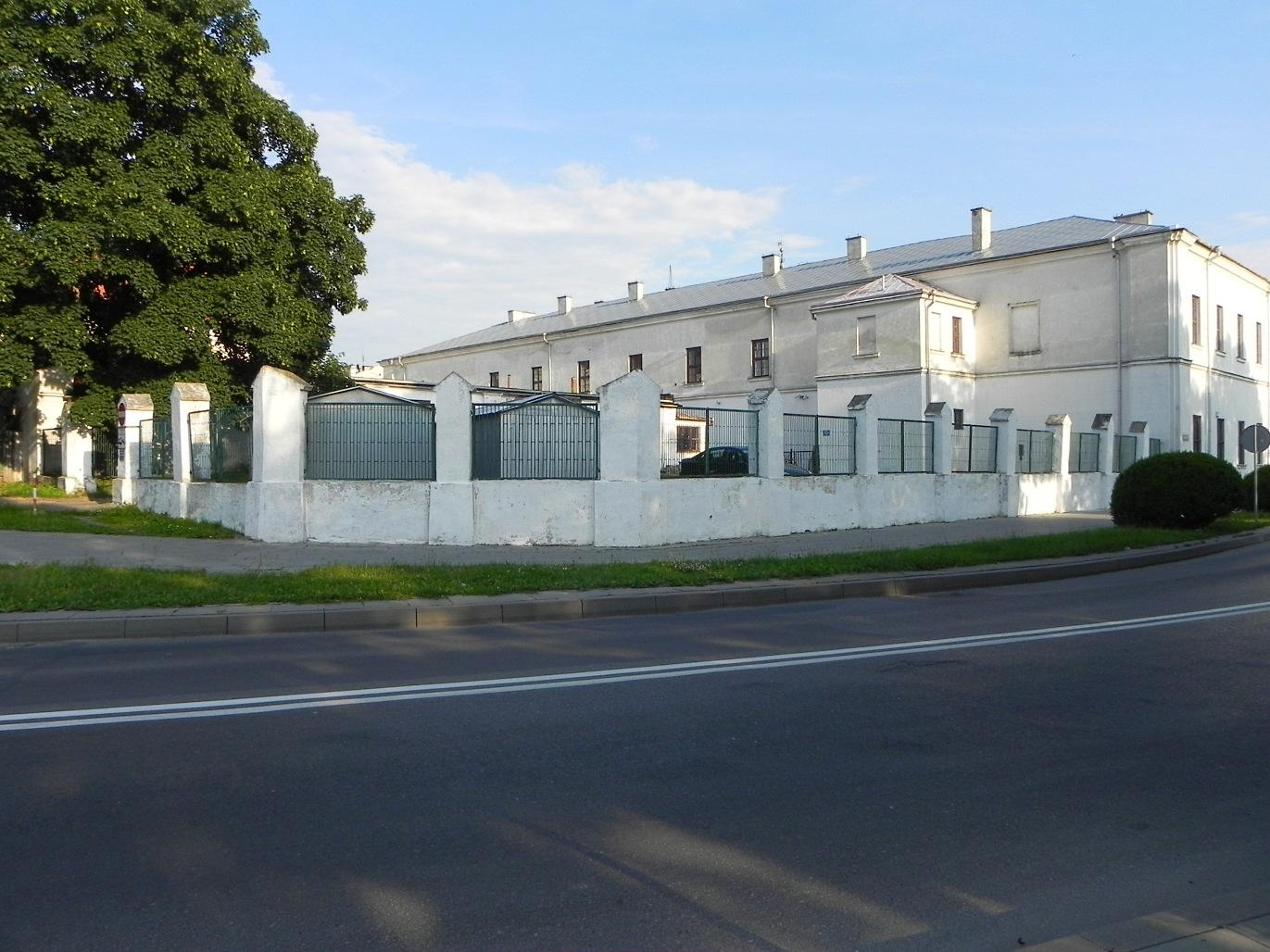 Tak wygląda dzisiaj miejsce w którym funkcjonował szkolny ogród zoologiczny Stefana Milera, późniejsze miejskie ZOO. Widoczny budynek to Akademia Zamojska.